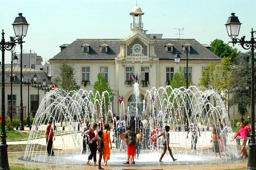 L'hôtel de ville de Drancy (Île-de-France)